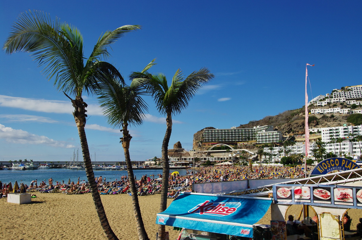 Playa de Puerto Rico (Puerto Escala)